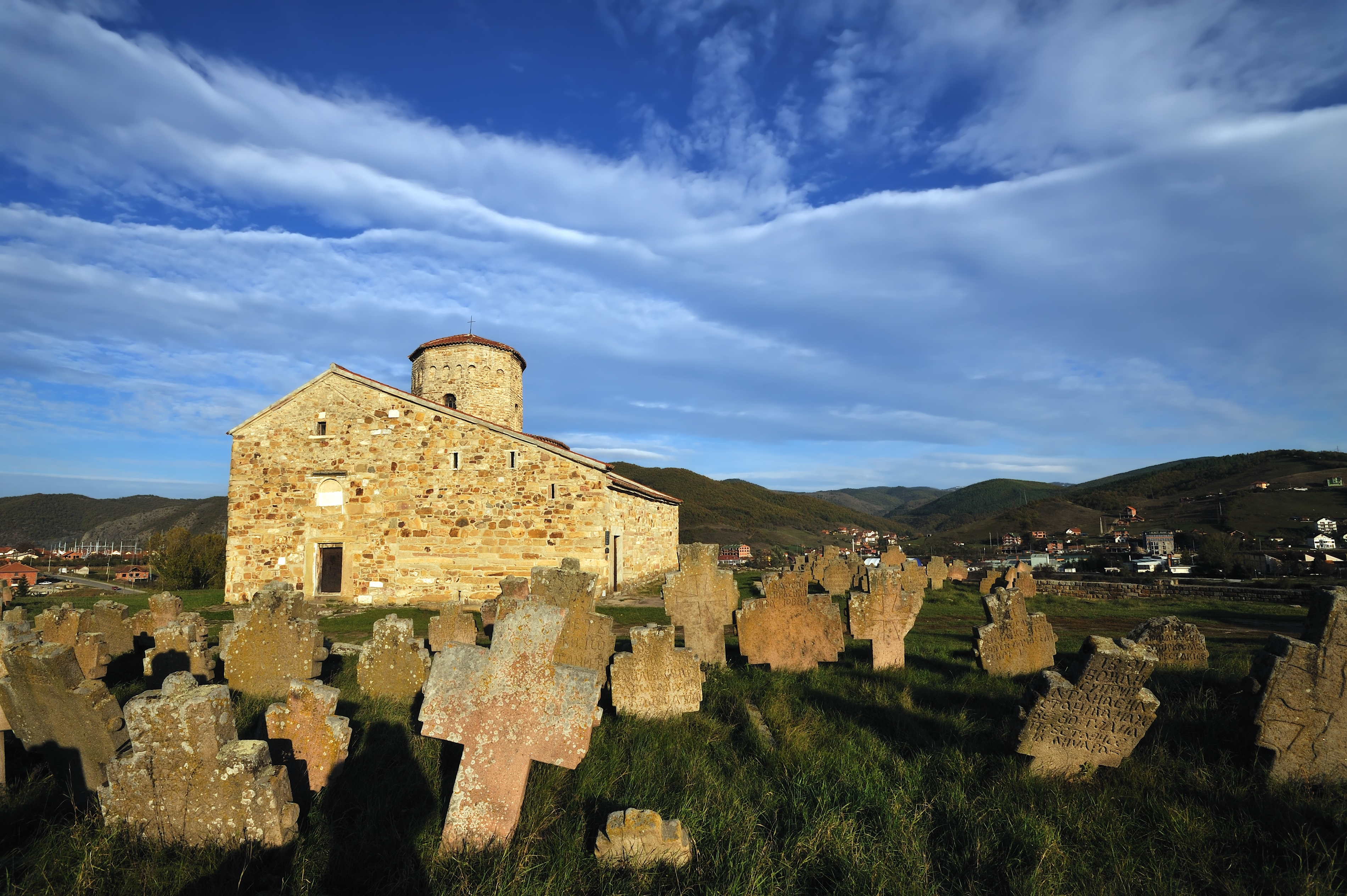 Crkva Svetih apostola Petra i Pavla